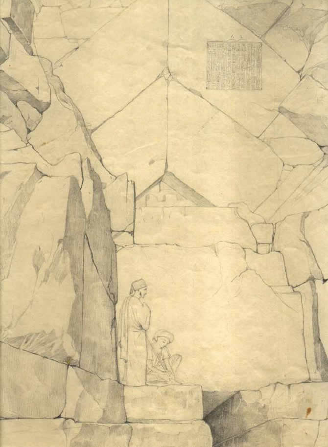 Oberer Eingang der Cheops-Pyramide mit der hieroglyphischen Inschrift zur Geburtstagsfeier des preußischen Königs. Bleistiftzeichnung. Signiert J.F. Archiv Inv.-Nr. 2427.